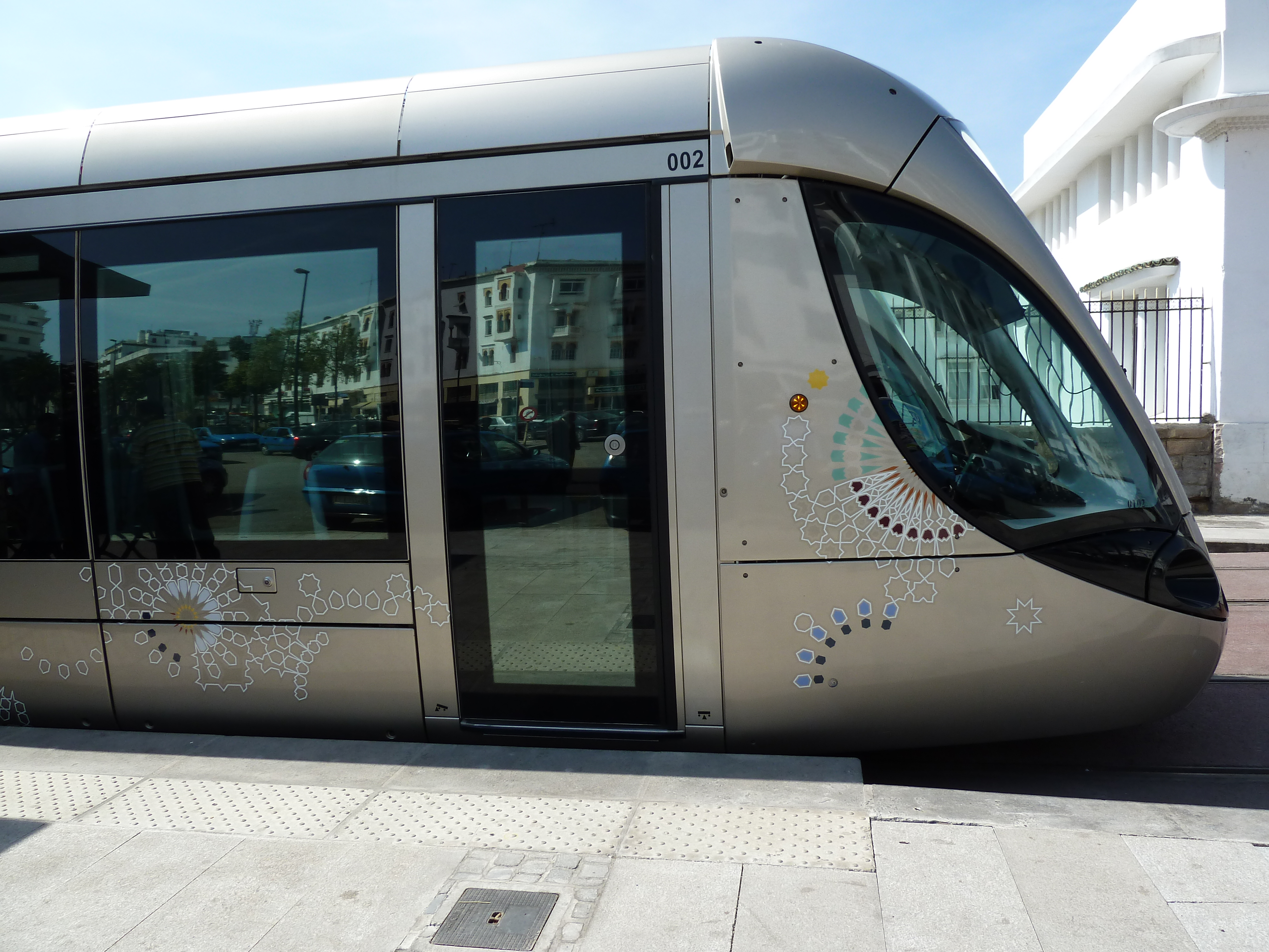 Tramway de Rabat-Salé au Maroc, Station Mohamed V Gare de Rabat